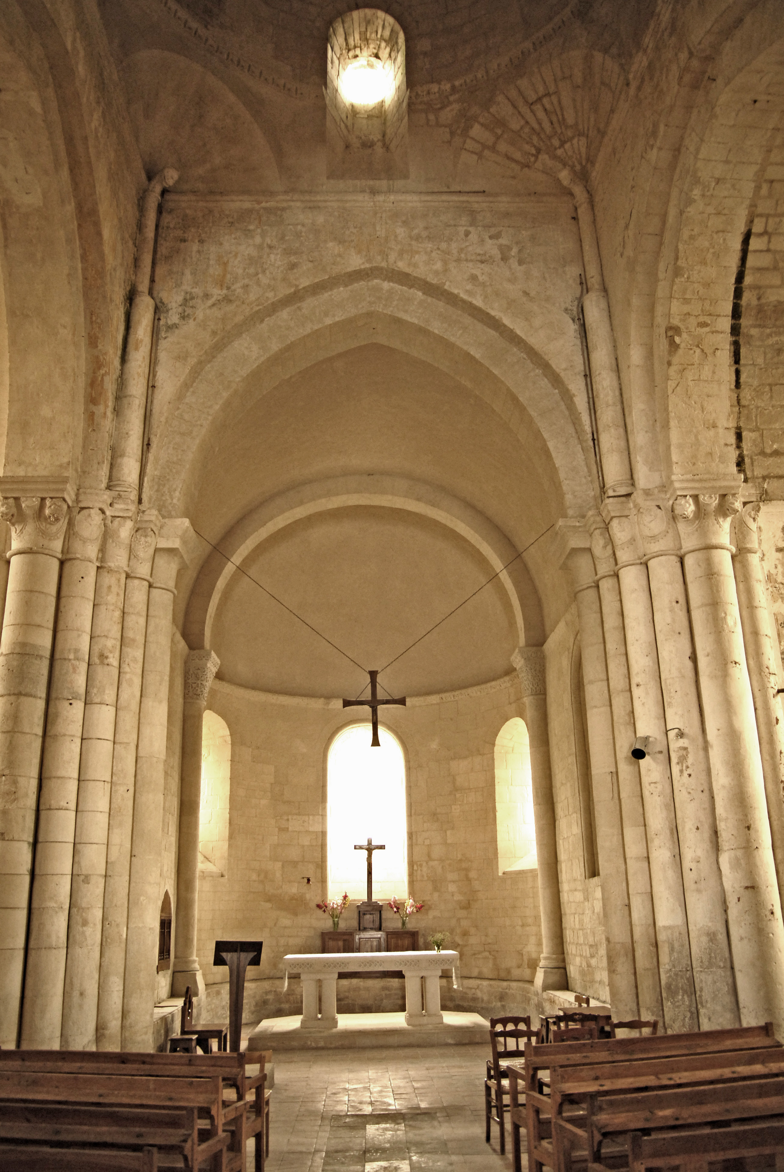 Notre-Dame Corme-Écluse, Chor aus Vierung